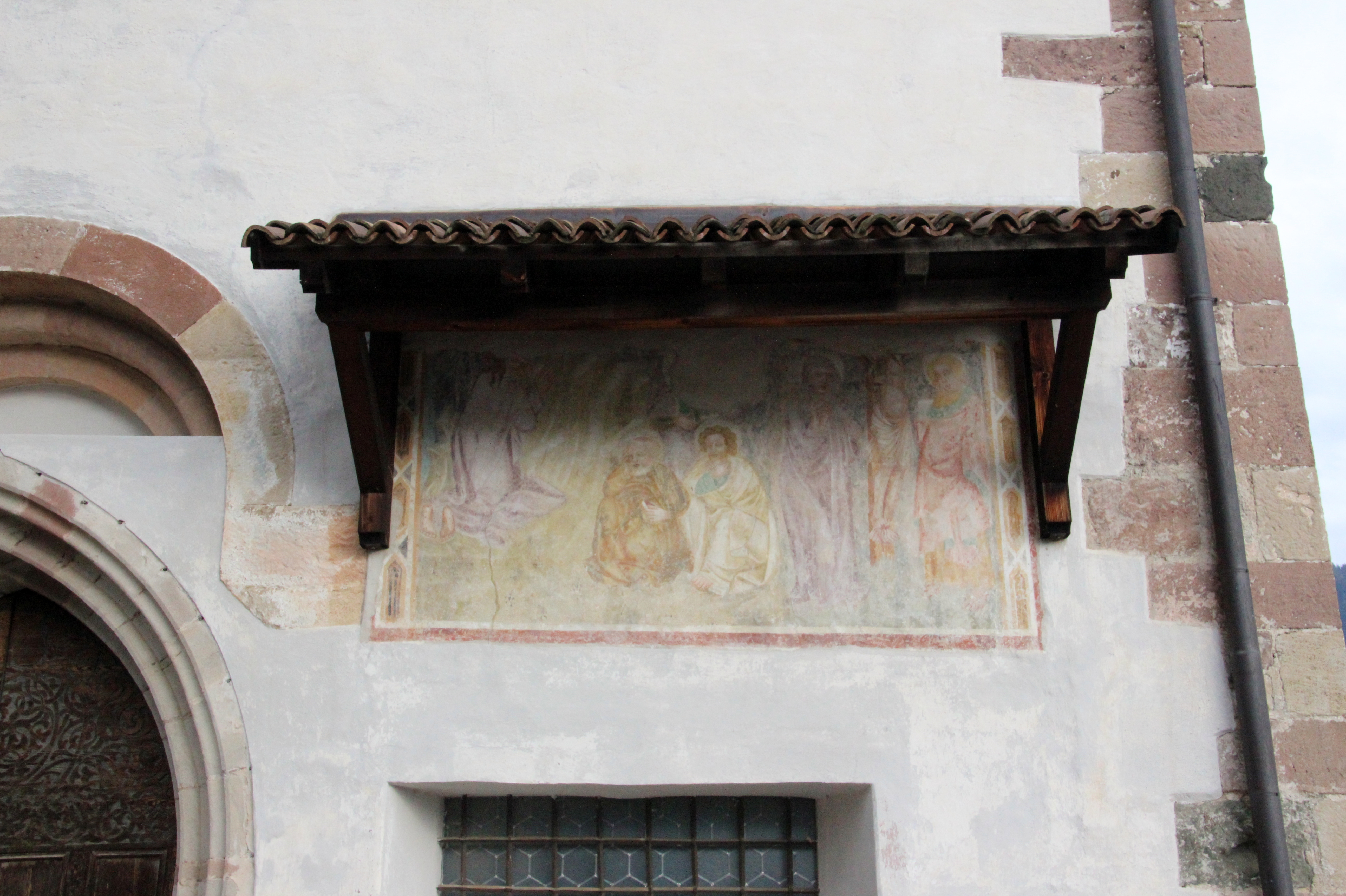 Pfarrkirche Maria Himmelfahrt in Schenna - Fresko an der Westseite